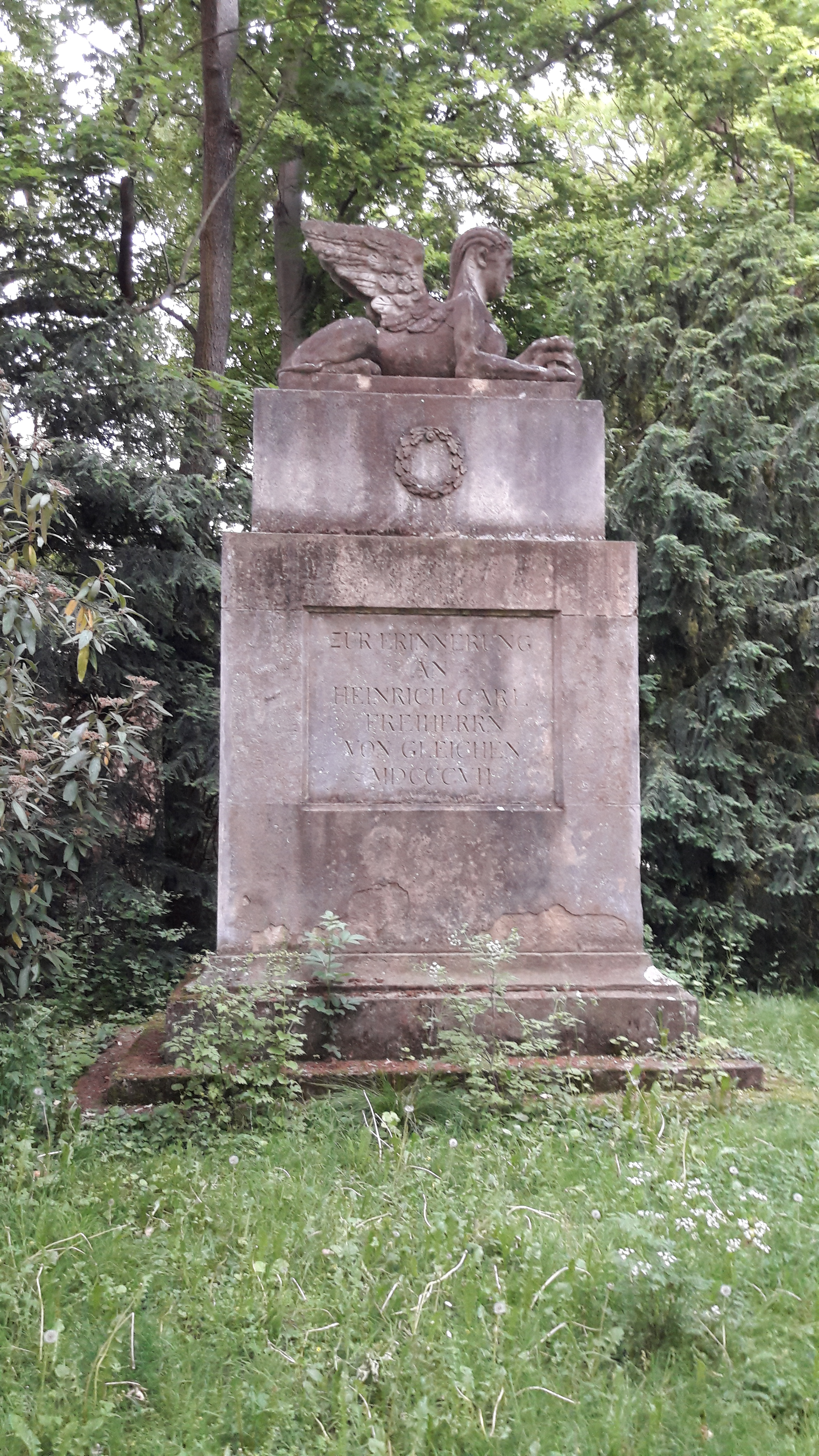 Denkmal für den Diplomaten Karl Heinrich von Gleichen beim Emmeramer Tor, Nähe Schloss St. Emmeram